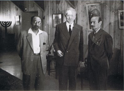 יוסף כהן בעת ביקורו אצל נשיא המדינה יצחק בן צבי בשנת 1958